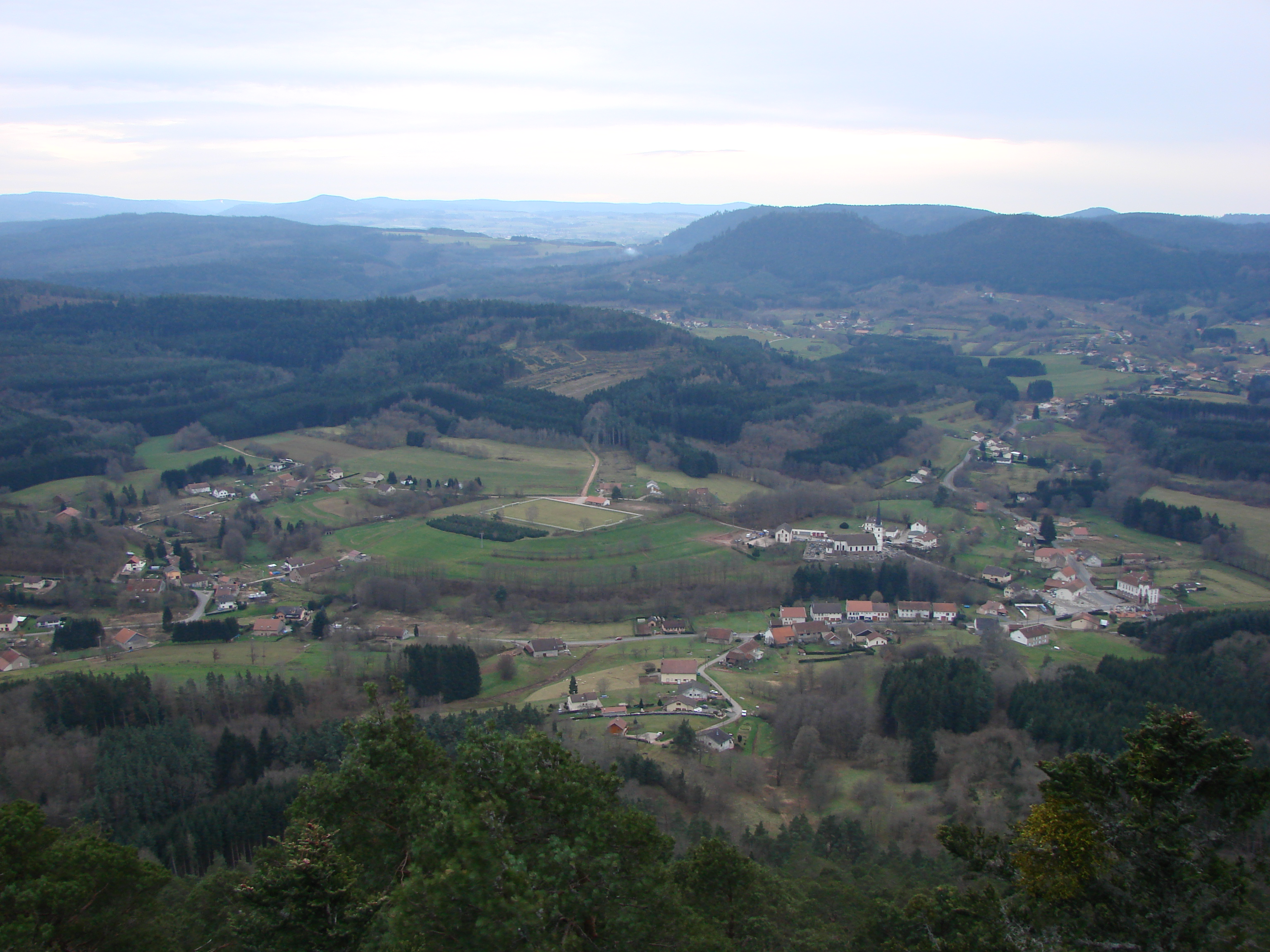 Vue sur les 3 vallées depuis la pierre de Laître